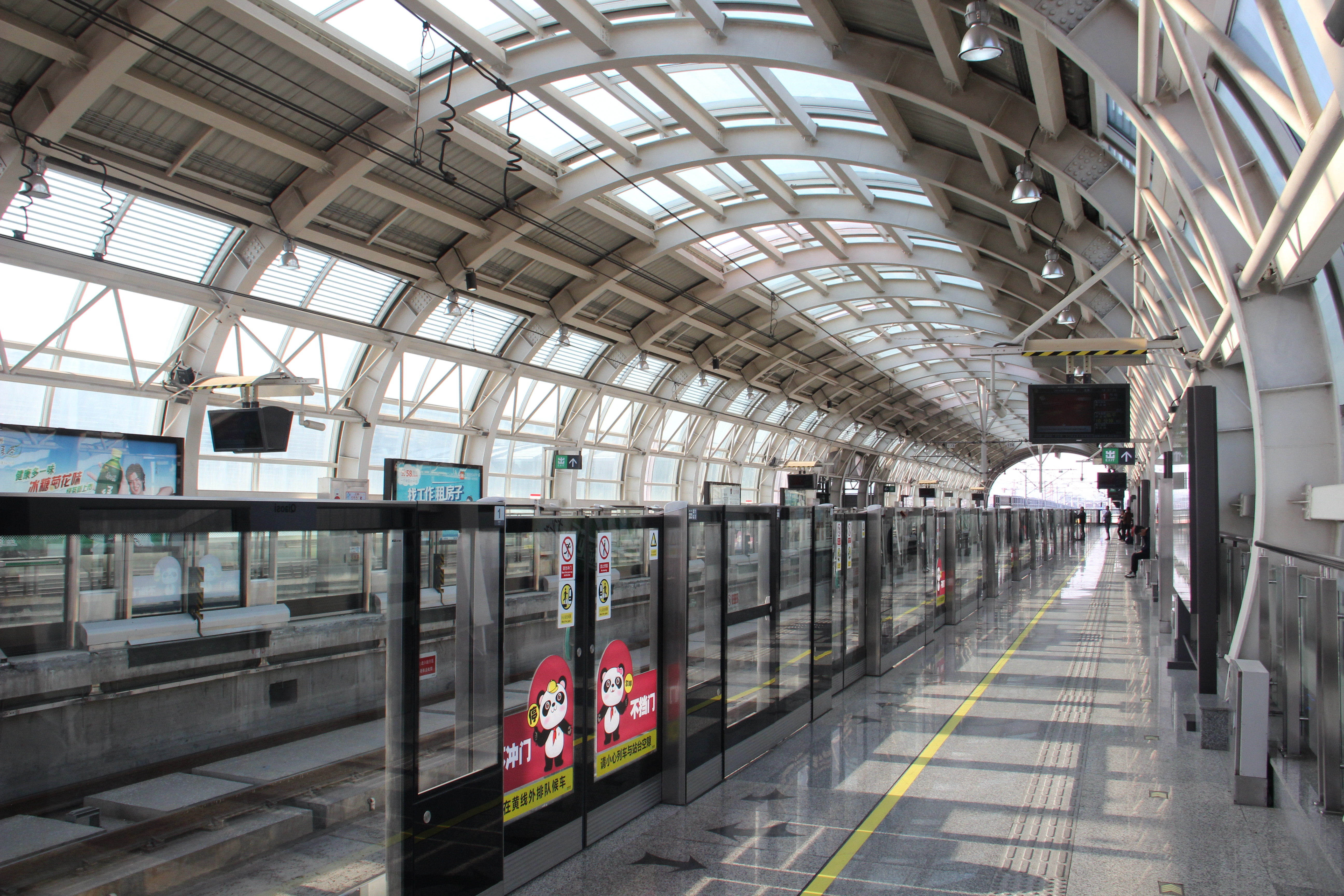 地铁乔司站站台